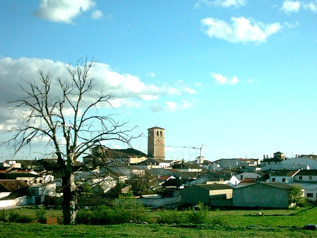 Vista general de Campillo de Altobuey con la torre de la iglesia parroquial, en la provincia de Cuenca (España)